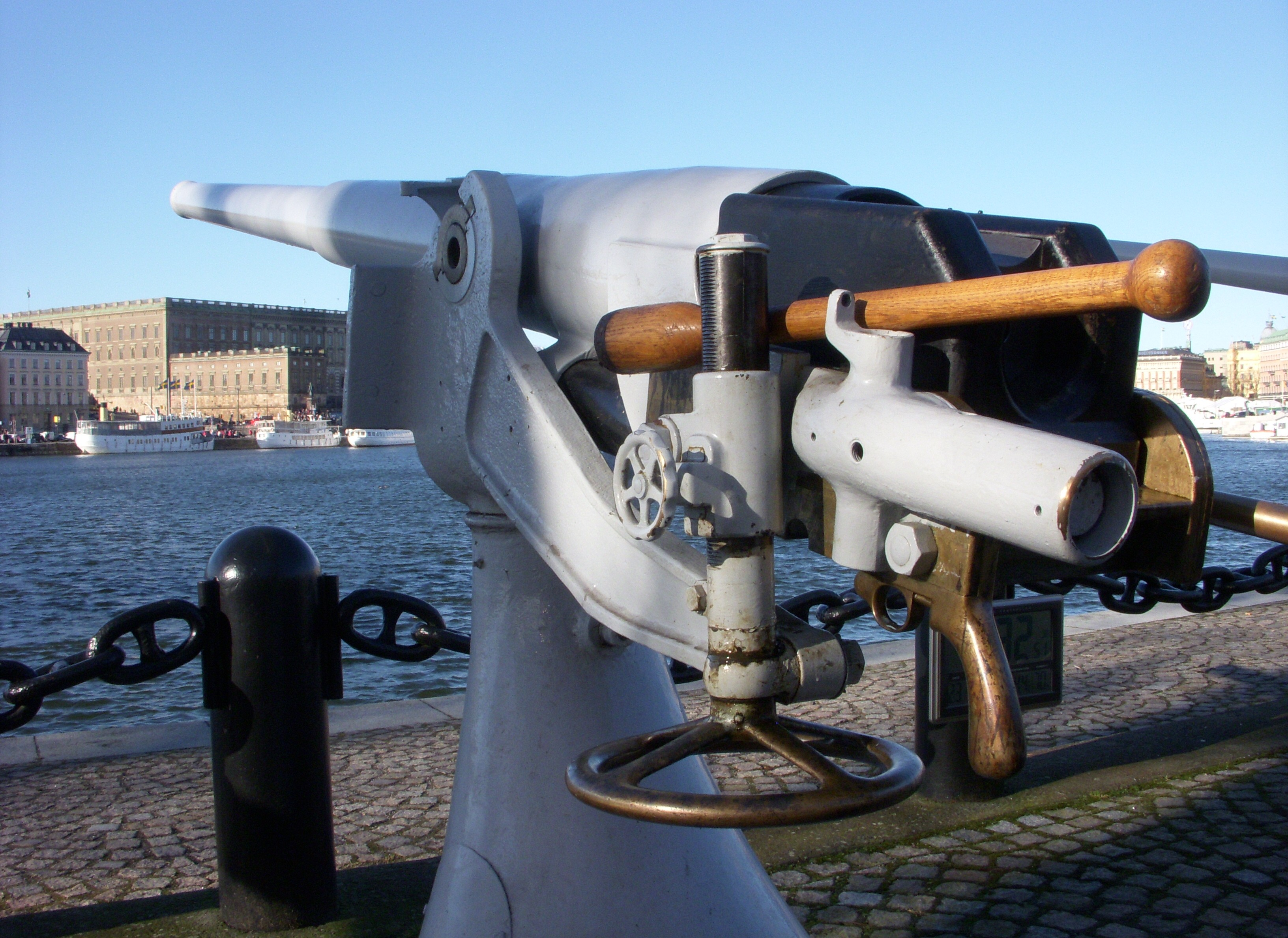 Salut från Skeppsholmen, Prinsessan Estelle är född